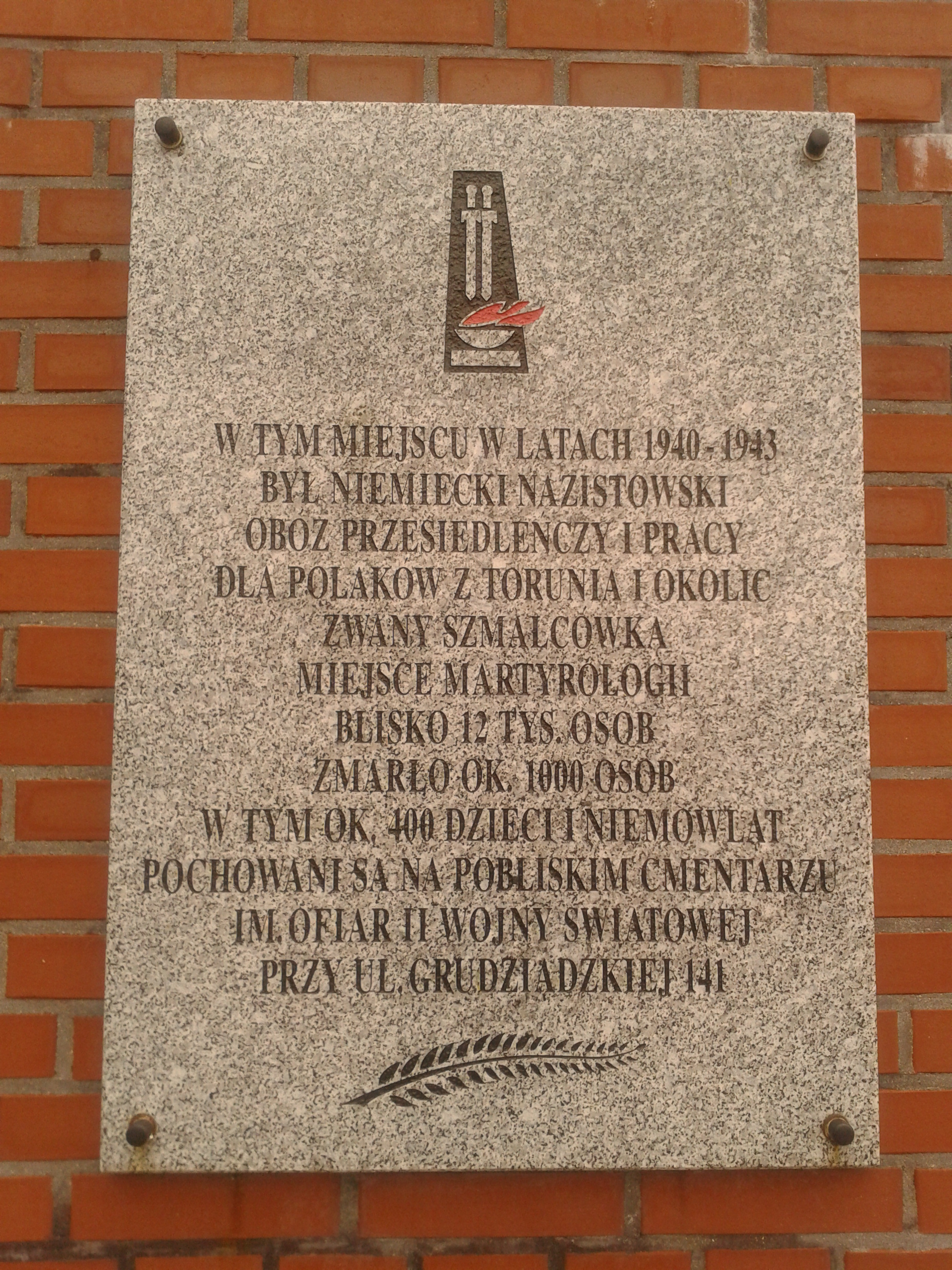 Główna (górna) tablica, na pomniku w formie fragmentu ceglanego muru, upamiętniająca ofiary Szmalcówki nazistowskiego obozu dla Polaków z Torunia i okolic. Pomnik stoi się przed parkingiem Urzędu Miasta Torunia znajdujacego się pod adresem ulica Grudziądzka 126 b inskrypcja na tablicy: W tym miejscu w latach 1940-1943/ Był niemiecki nazistowski/ Obóz przesiedleńczy i pracy/ Dla Polaków z Torunia i okolic/ Zwany szmalcówką/ Miejsce martyrologii/ Blisko 12 tysięcy osób/ Zmarło około 1000 osób/ W tym około 400 dzieci i niemowląt/ Pochowani są na pobliskim cmentarzu/ Imienia ofiar II wojny światowej/ Przy ulicy Grudziądzkiej 141